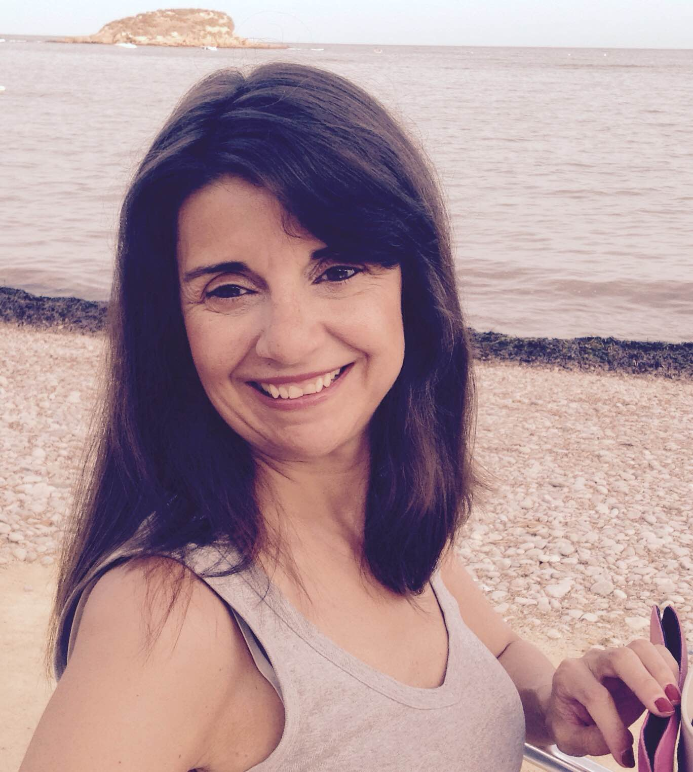 La escritora Gabriela Bustelo en la playa de Altea, verano de 2014